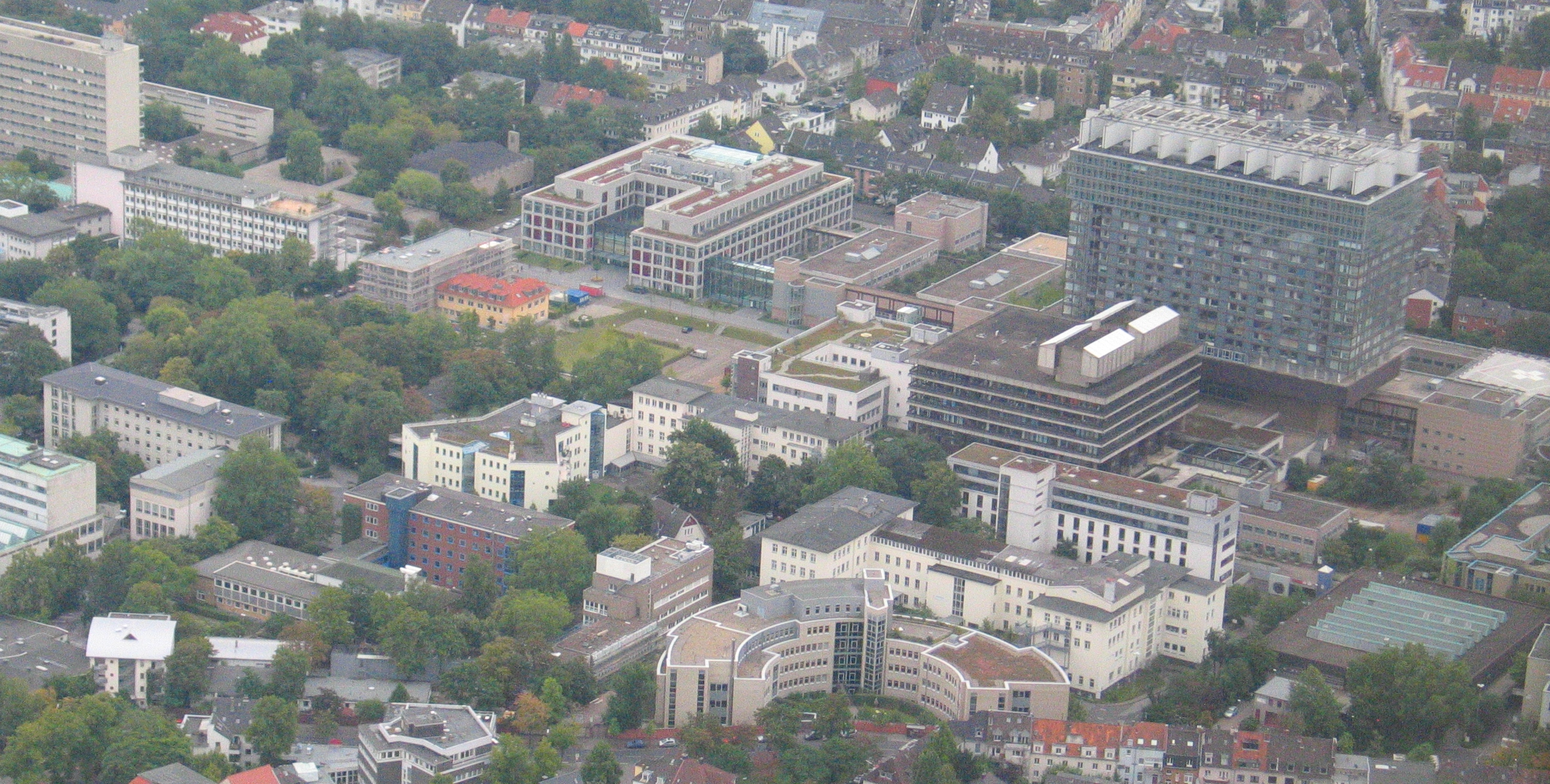 Uniklinik Köln aus der Luft (Nordansicht)